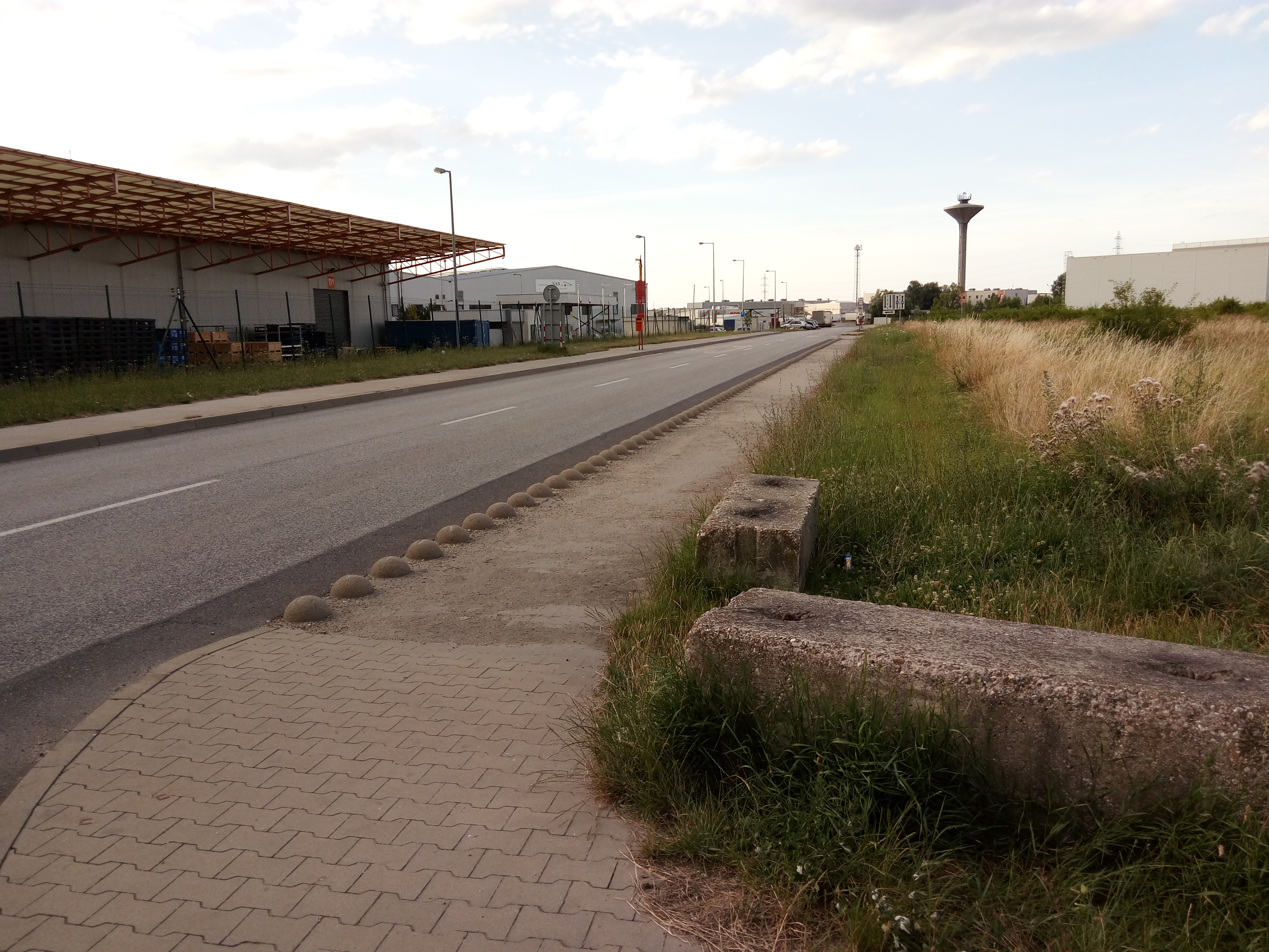 Opletalova, Devínska Nová Ves, Bratislava